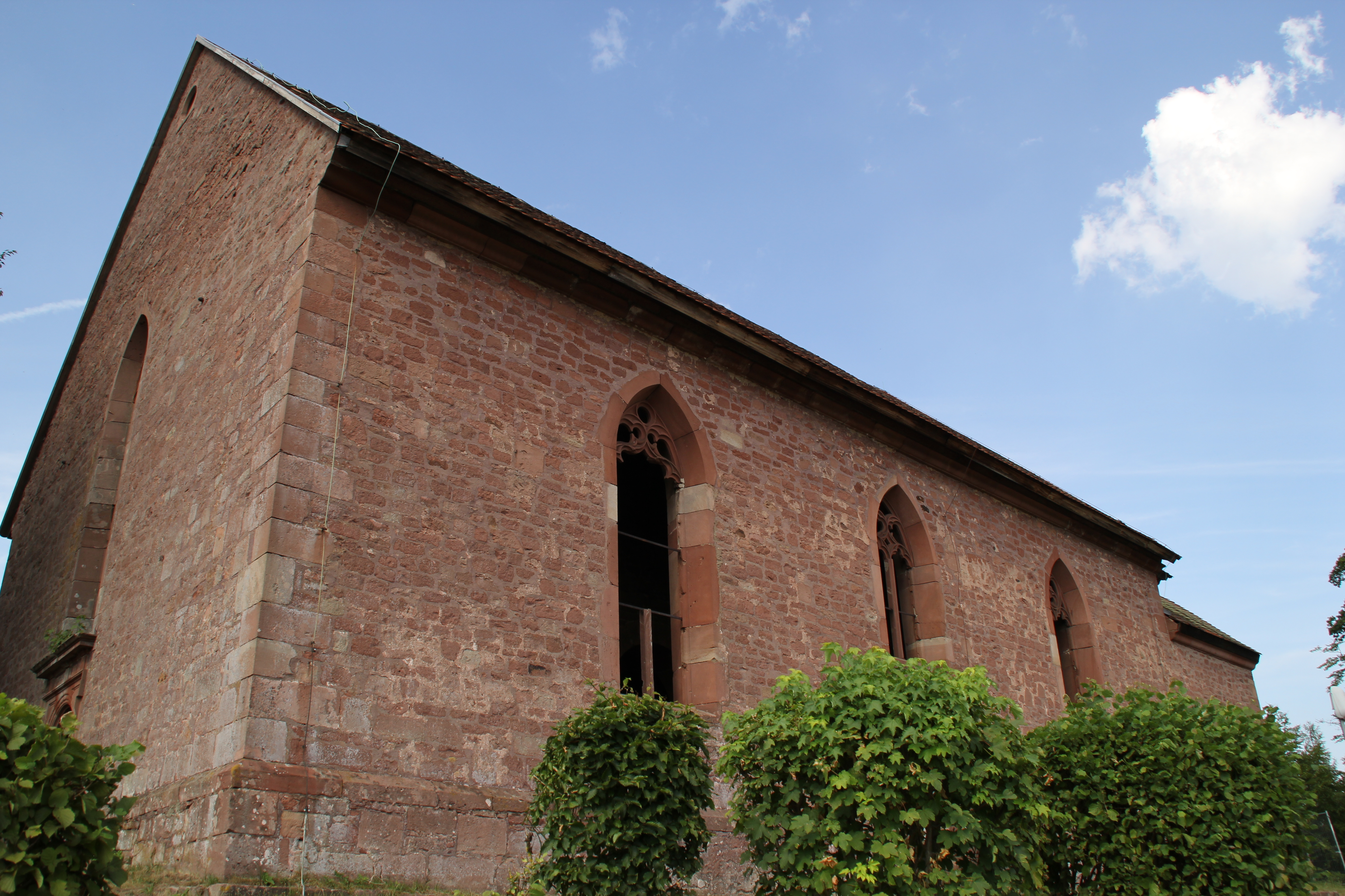 Die Gotthardsruine auf dem Gotthardsberg bei Amorbach im Odenwald